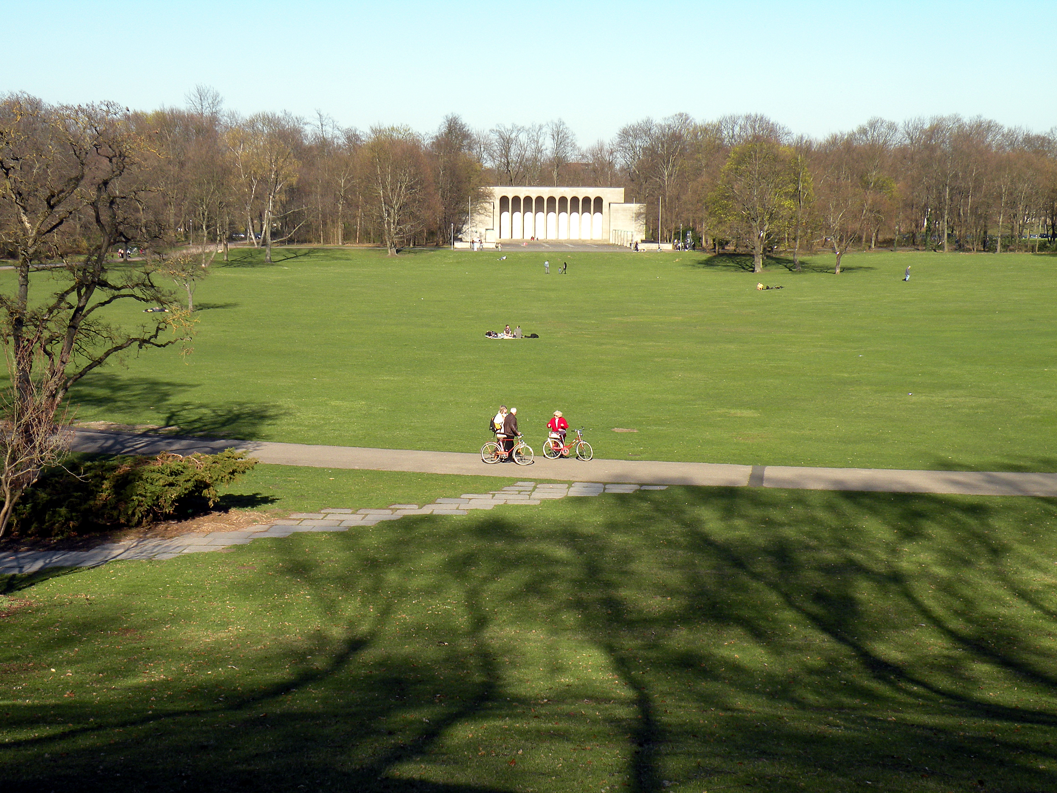 Луитпольдарена.